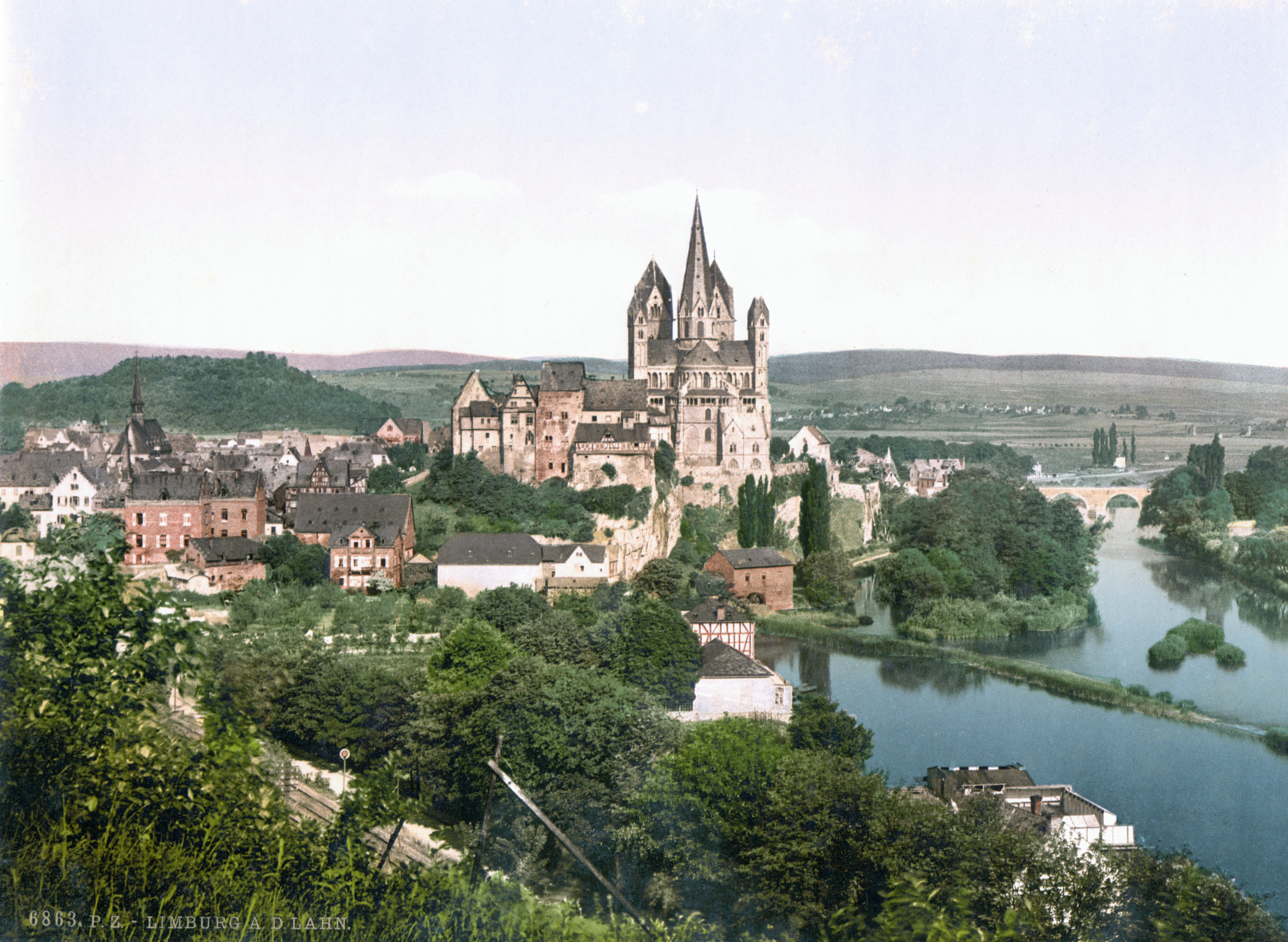 Limburg an der Lahn um 1900 This is a picture of the hessian Kulturdenkmal (cultural monument) with the ID 52993 This is a picture of the hessian Kulturdenkmal (cultural monument) with the ID 53176